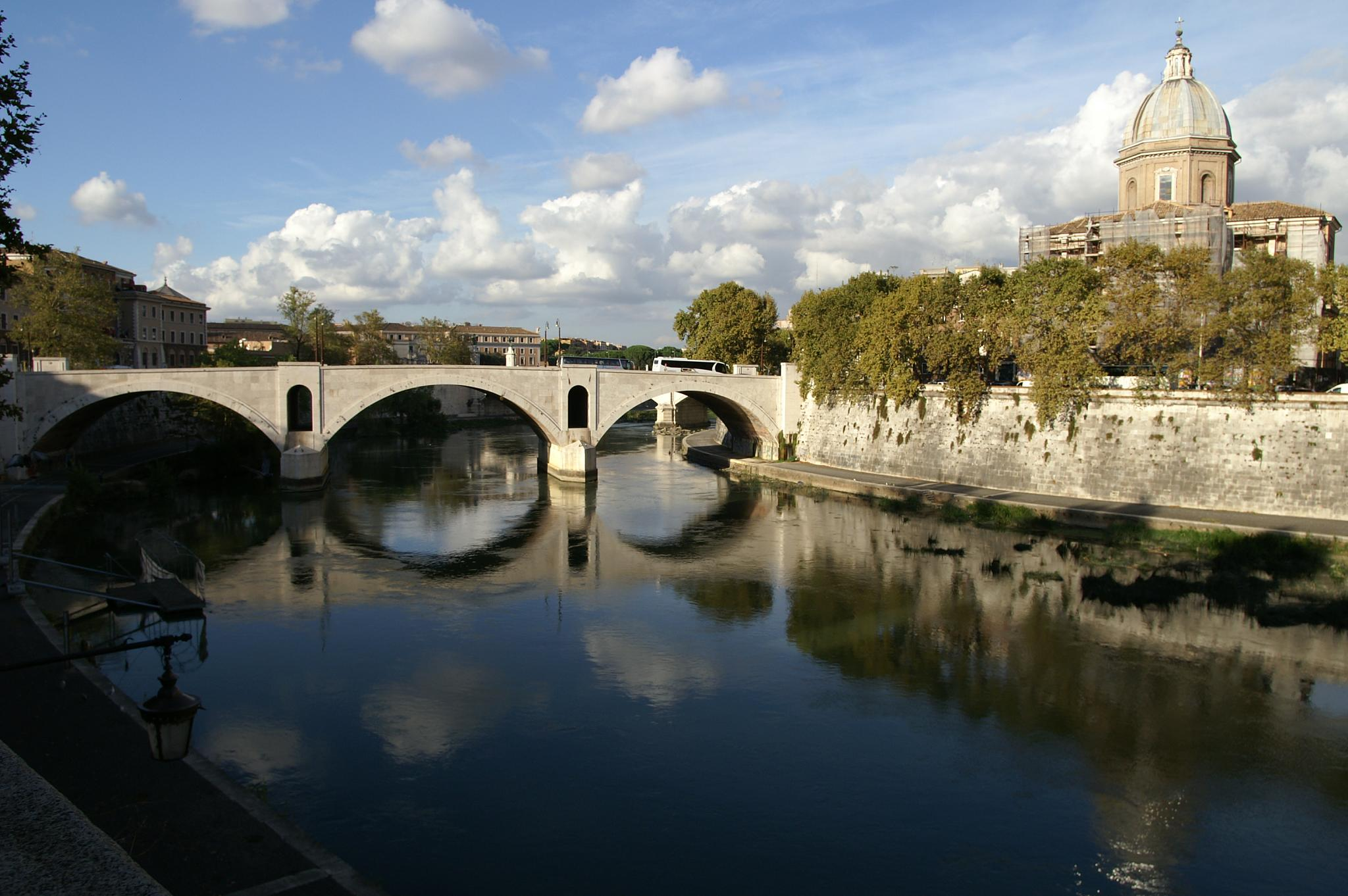 Rome Ponte Principe Amedeo Savoia Aosta [?]